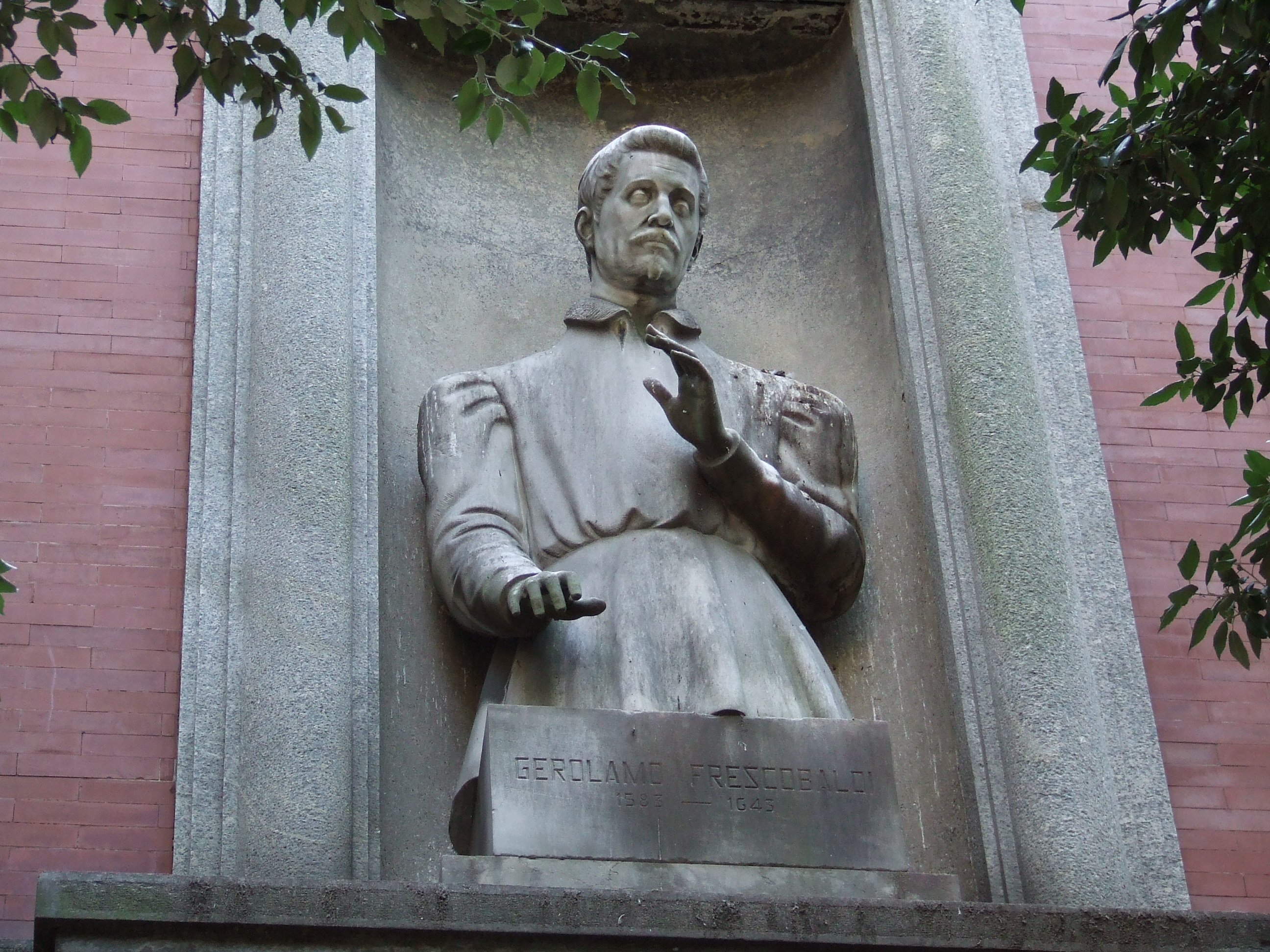 Busto di Gerolamo Frescobaldi, opera di Giuseppe Virgili, posta nel 1948, sovrastante il portone principale di entrata del Conservatorio di Musica di Ferrara G.Frescobaldi